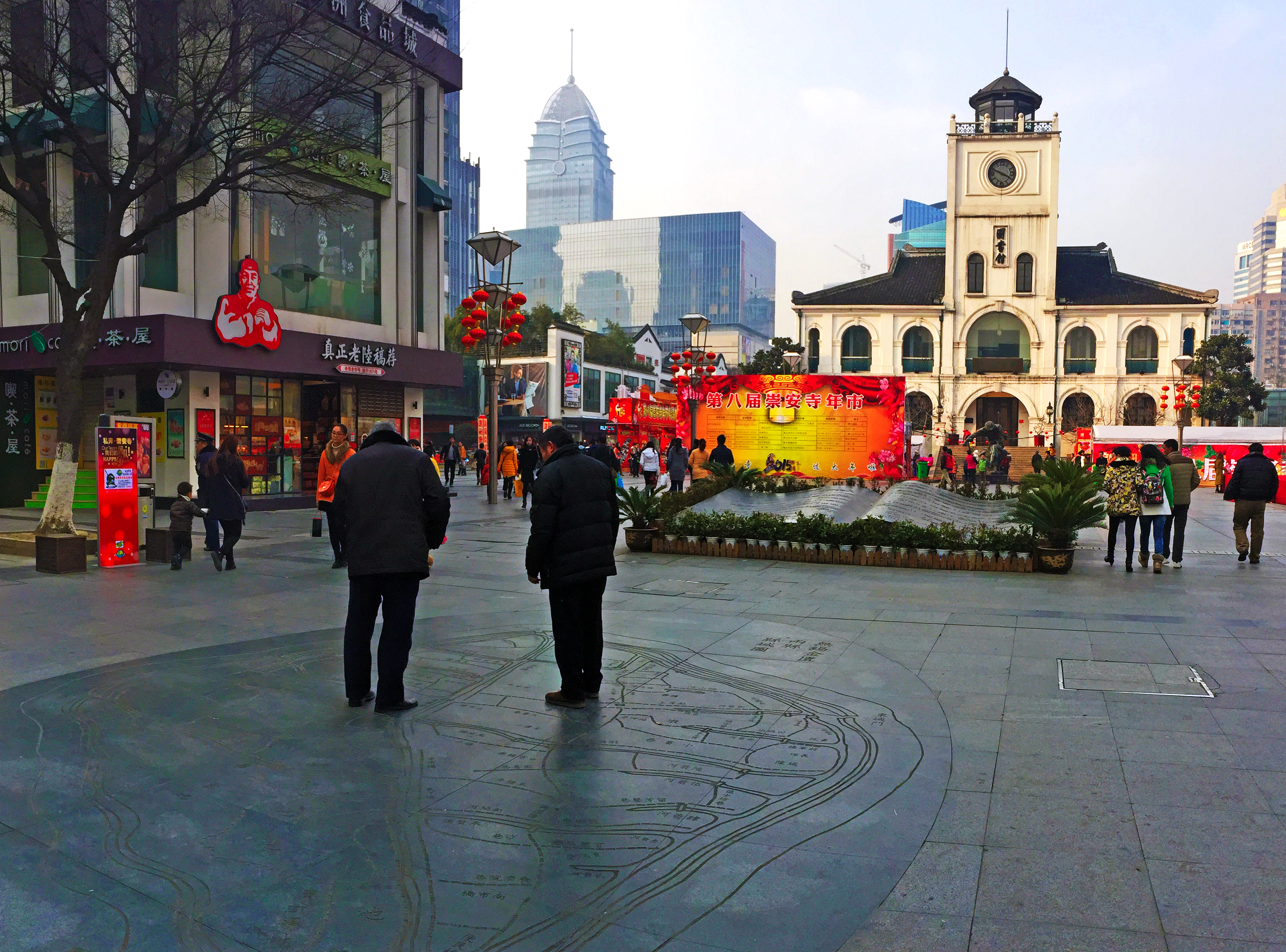 無錫老圖書館鐘樓舊址